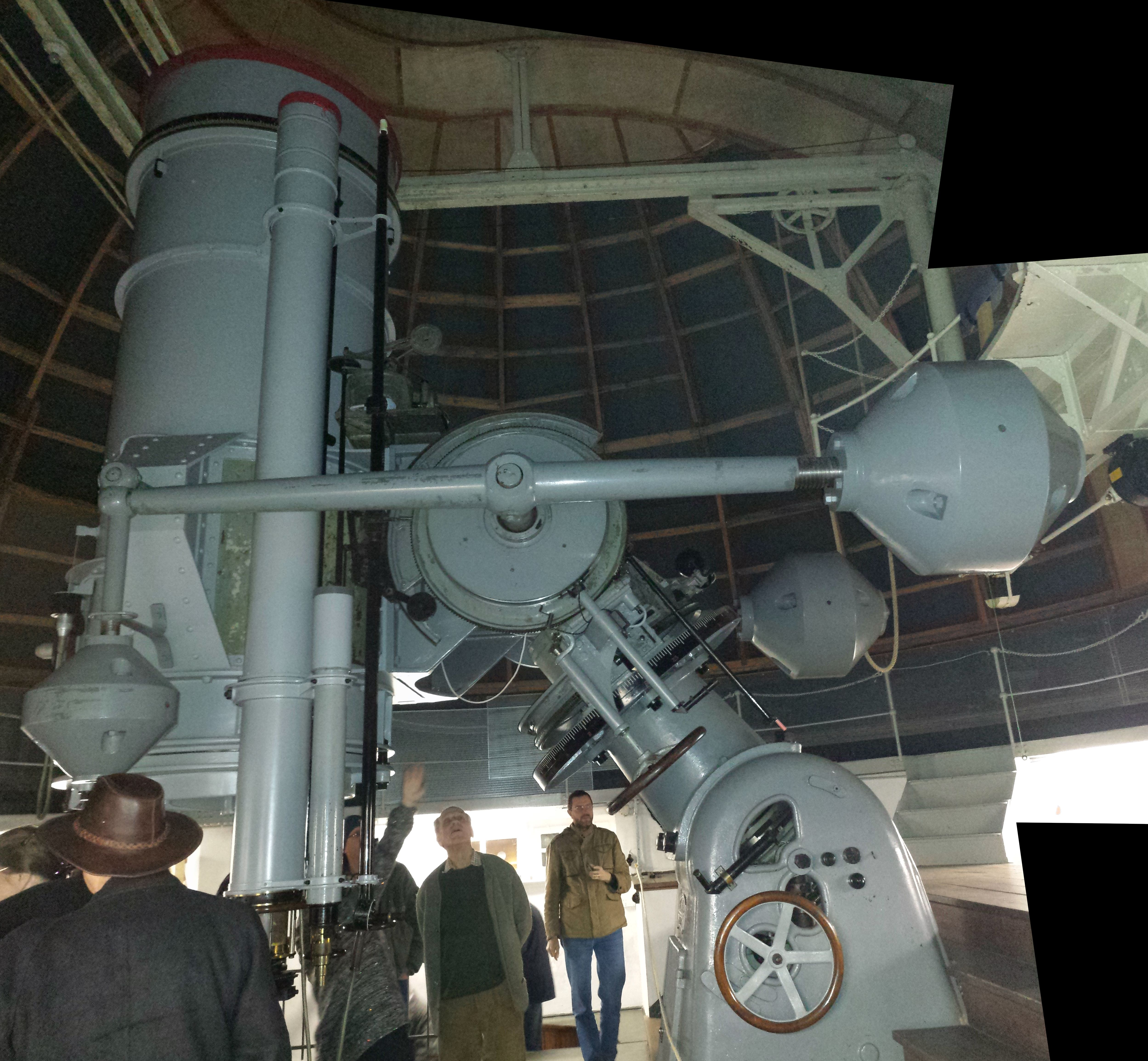 1-m-Spiegelteleskop der Hamburger Sternwarte nach der Restaurierung. Gut erkennbar die spezielle Entlastungsmontierung.